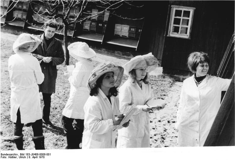 Kalkreuth, Auszubildende zum Imker Zentralbild Häßler 8.4.70-ch Bezirk Dresden: Imker - ein seltener Lehrberuf. Imkerlehrmeister Heinz Schindler unterweist die Lehrlinge des 1. Lehrjahres Helga Fritsch (l.) und Gert Biermann. Jährlich werden 5 junge Imker im Jugendobjekt Lehrbienenstand des VEG Kalkreuth im Kreis Großenhain ausgebildet. Die Lehrlinge des Kalkreuther Lehrbienenstandes bewirtschaften und betreuen 200 Bienenvölker. Im Leninaufgebot der FDJ haben sich die Lehrlinge u.a. verpflichtet, die ihnen übertragenen Produktionsabschnitte gewissenhaft zu betreuen, um dadurch zu noch besseren Produktionsergebnissen zu kommen.